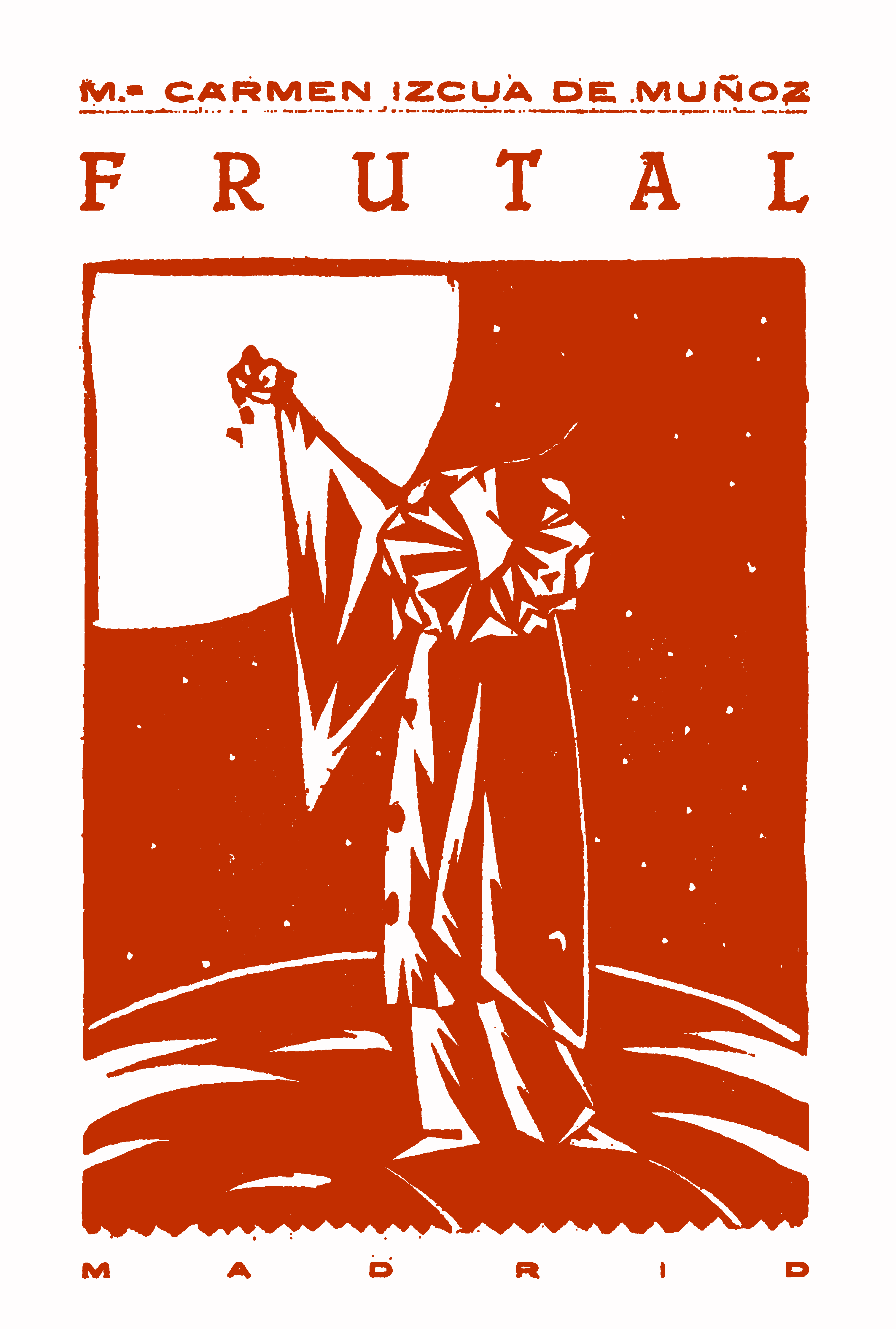 Portada del libro Frutal (1924) de la escritora uruguaya María Carmen Izcua (1885-1952).